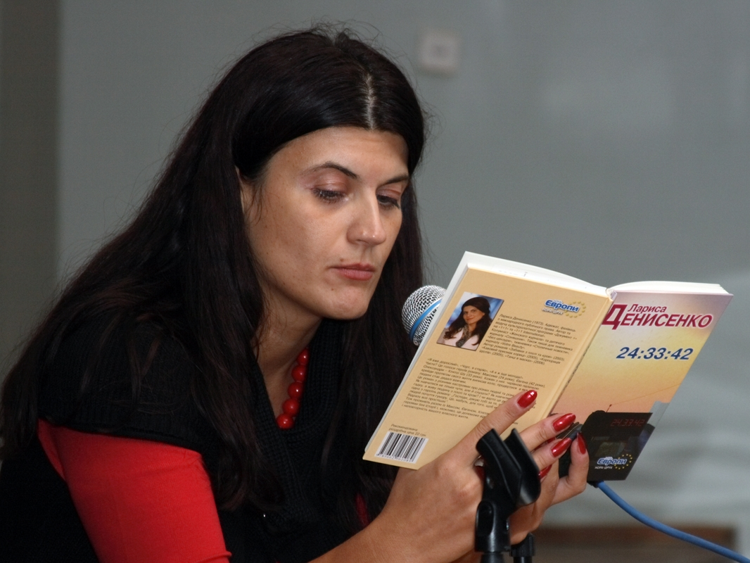 Лариса Денисенко, украинский литератор и журналист